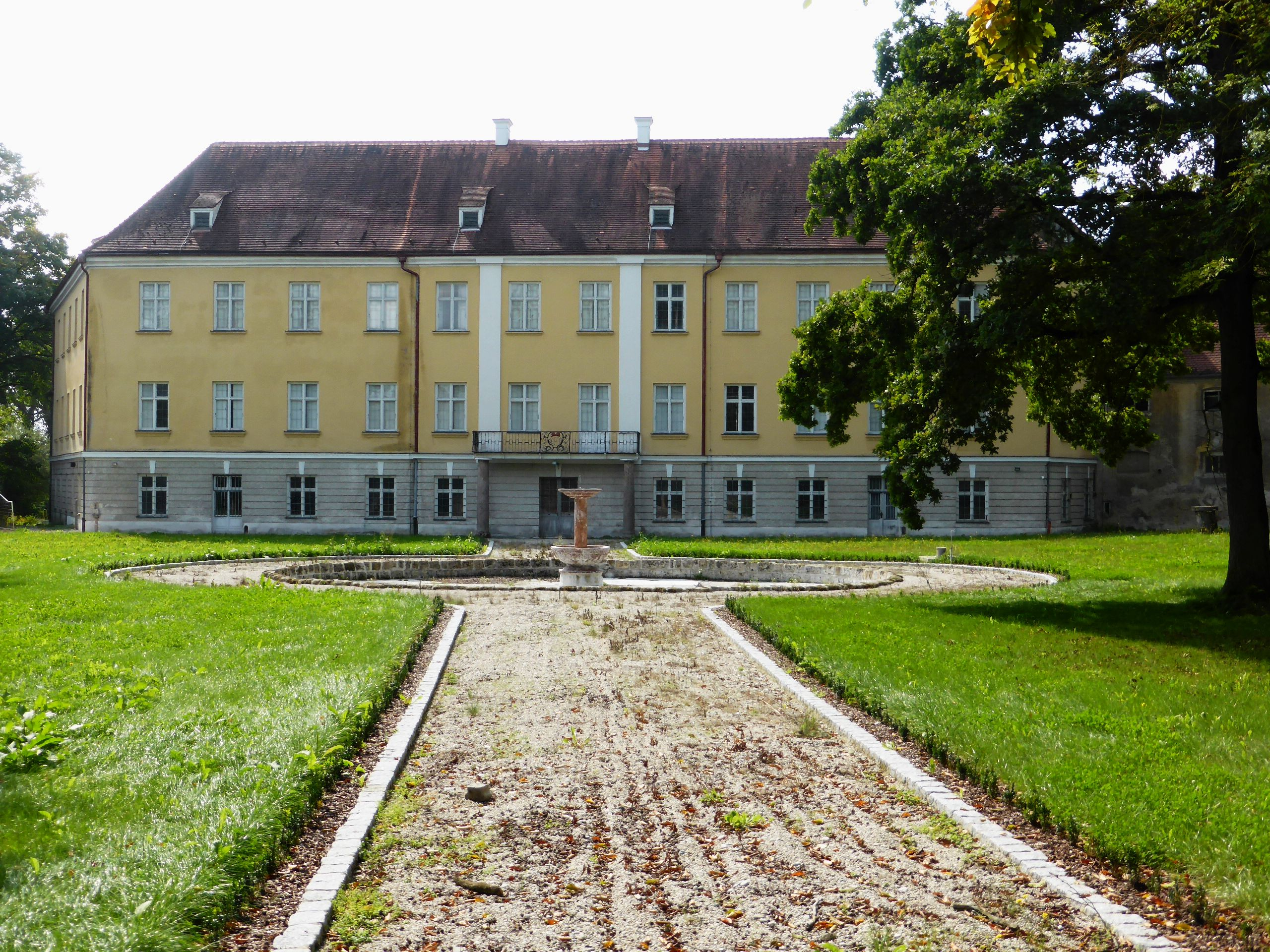 Schloss Ering